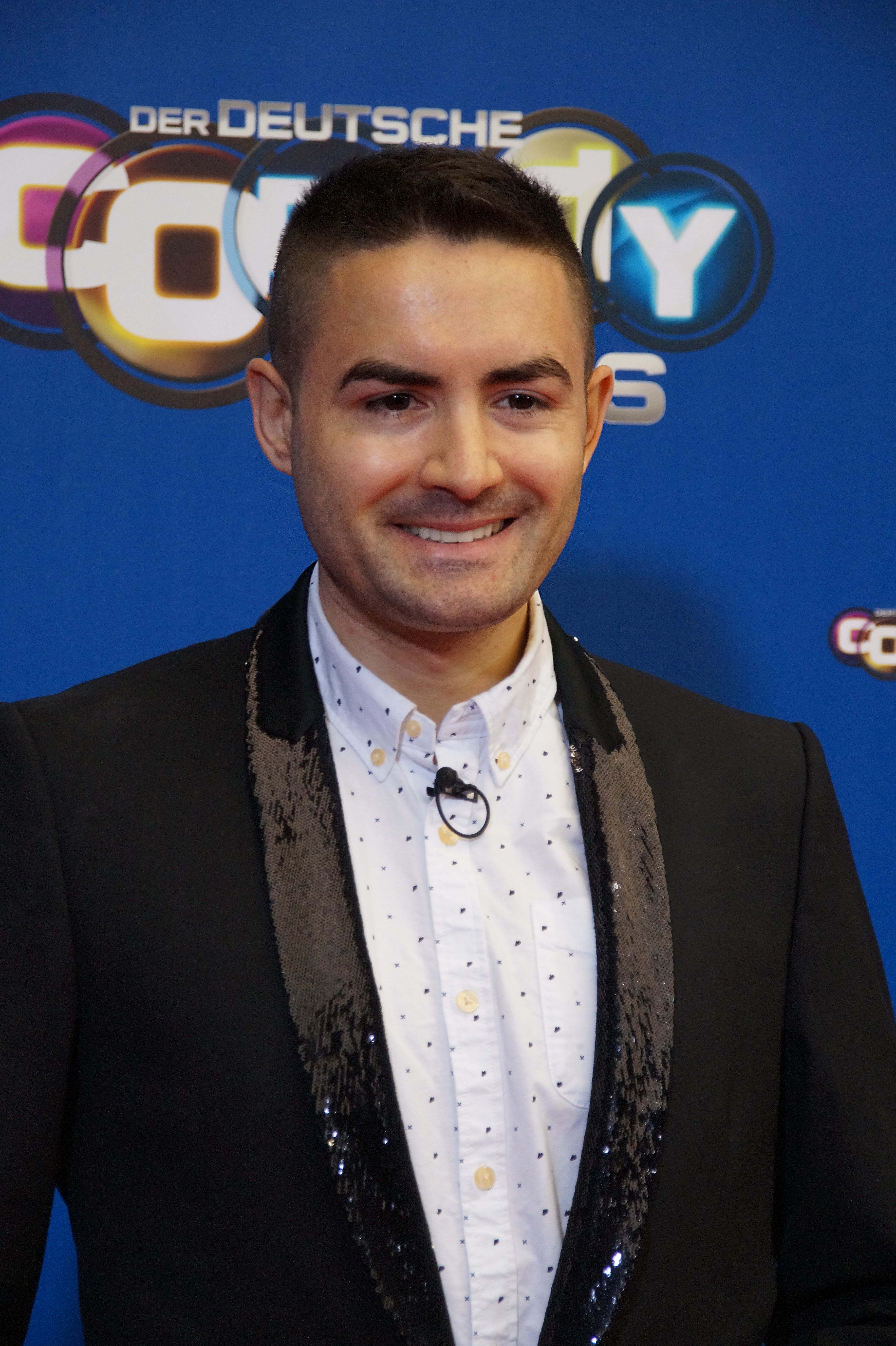 Menderes Bağcı beim Comedypreis 2016, Oktober, Köln.